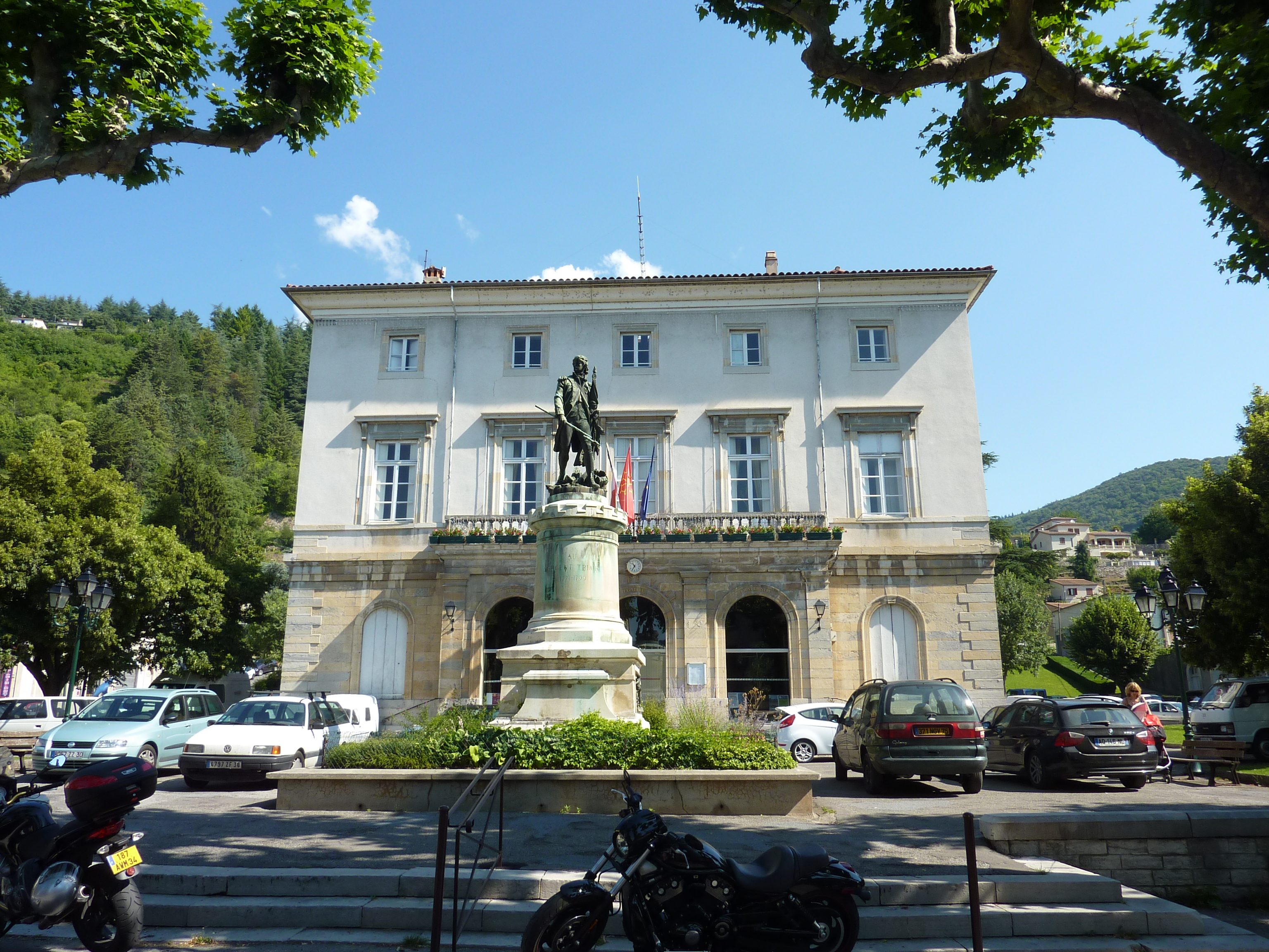 Le Vigan: l'hôtel de ville